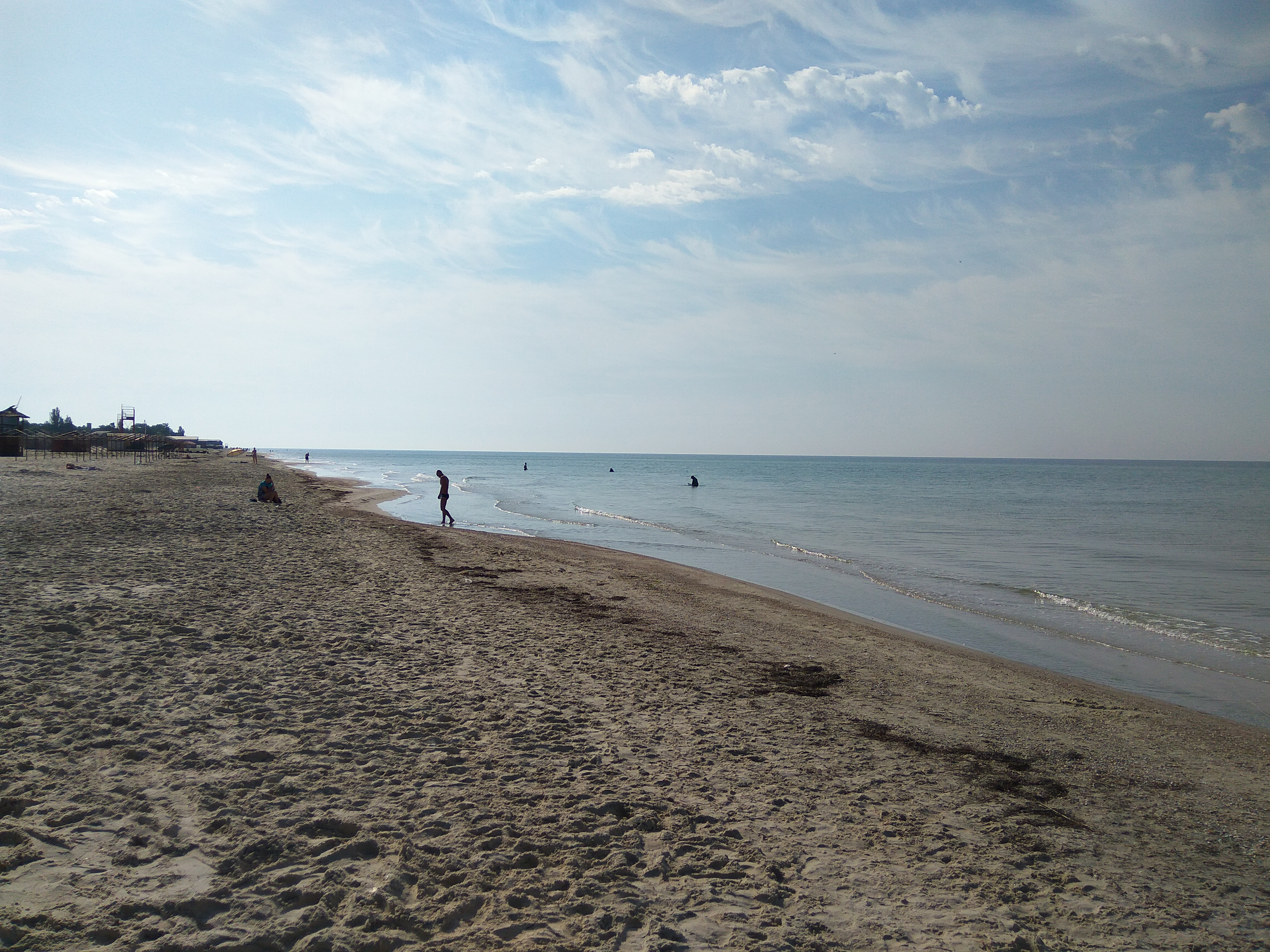 Пляж у Лазурному